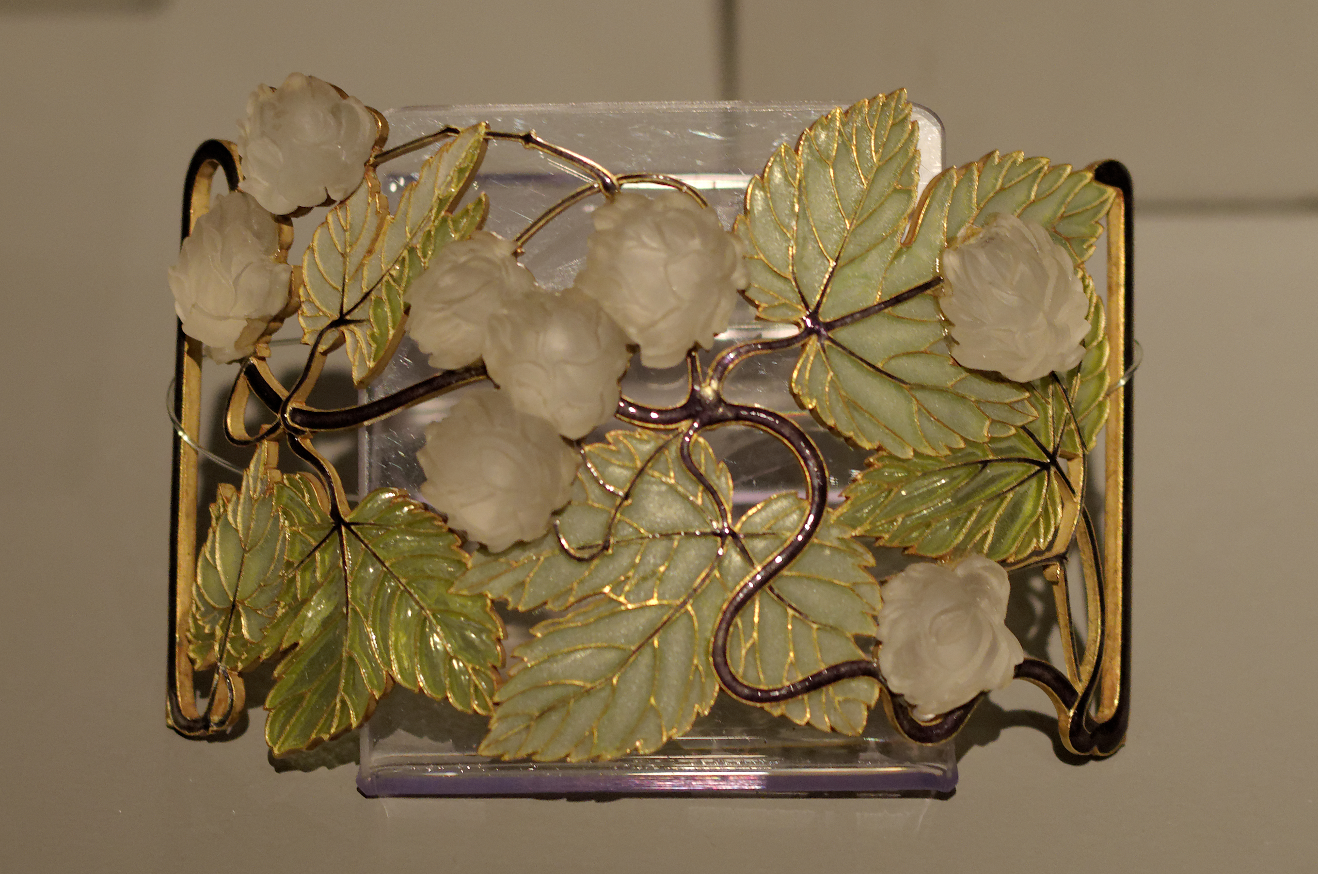 Collier René Jules Lalique, Paris c 1898-1900. Exposé au musée des arts décoratifs de Budapest, exposition temporaire "Les maîtres de l'Art nouveau" Mai 2013-fév 2014